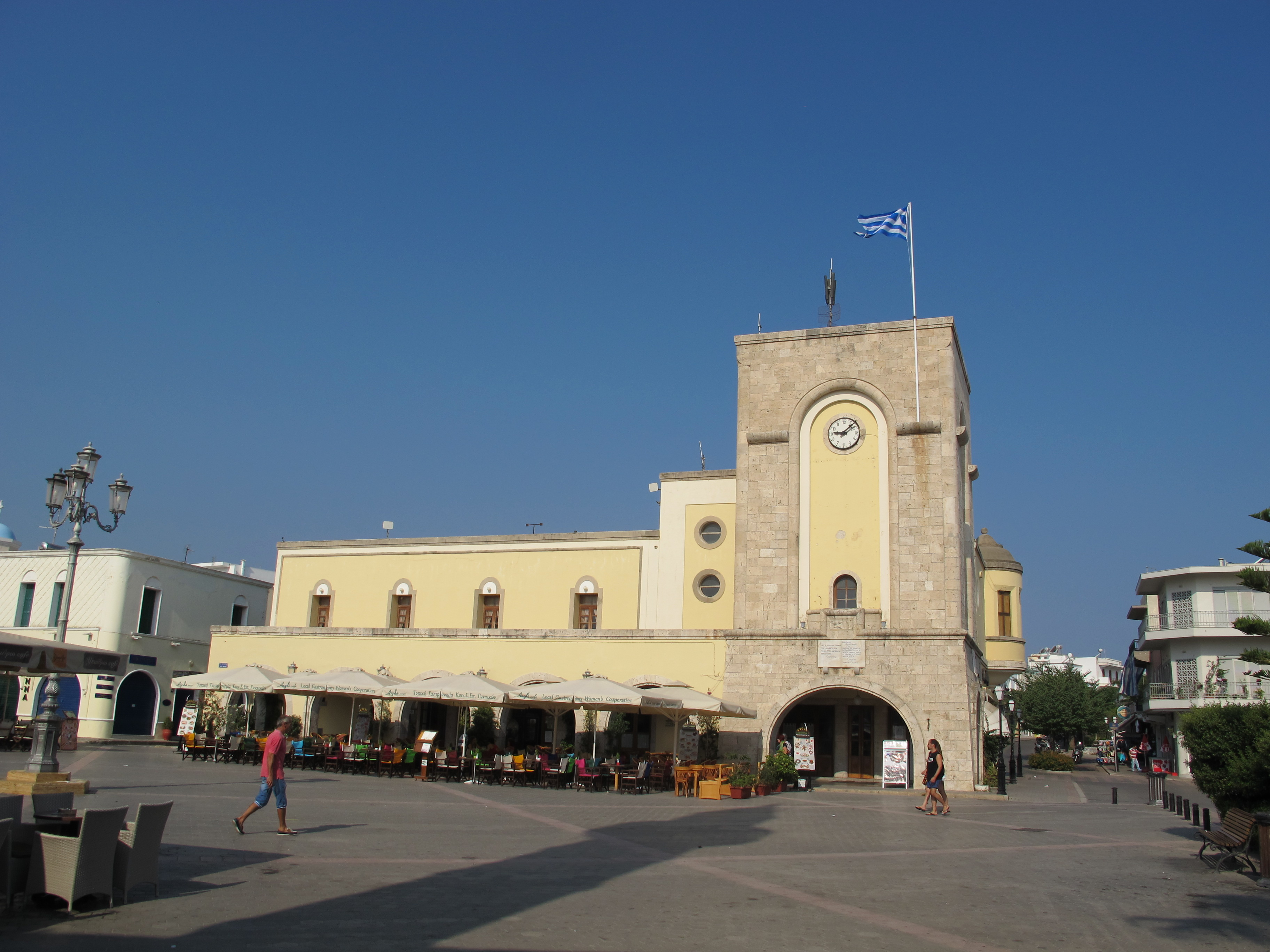 Kos città, piazza eleftherias, edificio razionalista